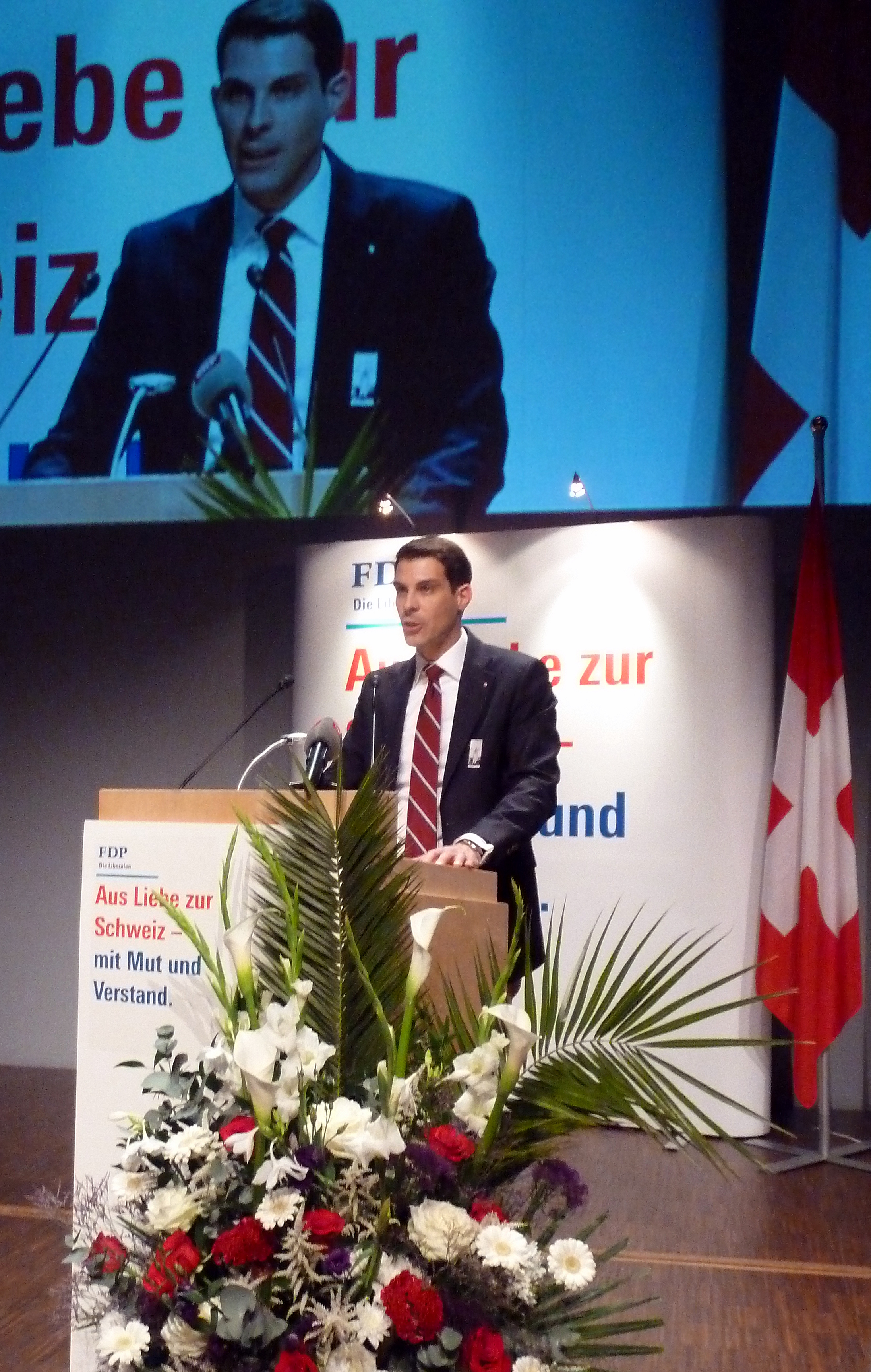 Thierry Burkart, Präsident der FDP.Die Liberalen Aargau, eröffnet die Delegiertenversammlung der FDP Schweiz in Baden/AG.